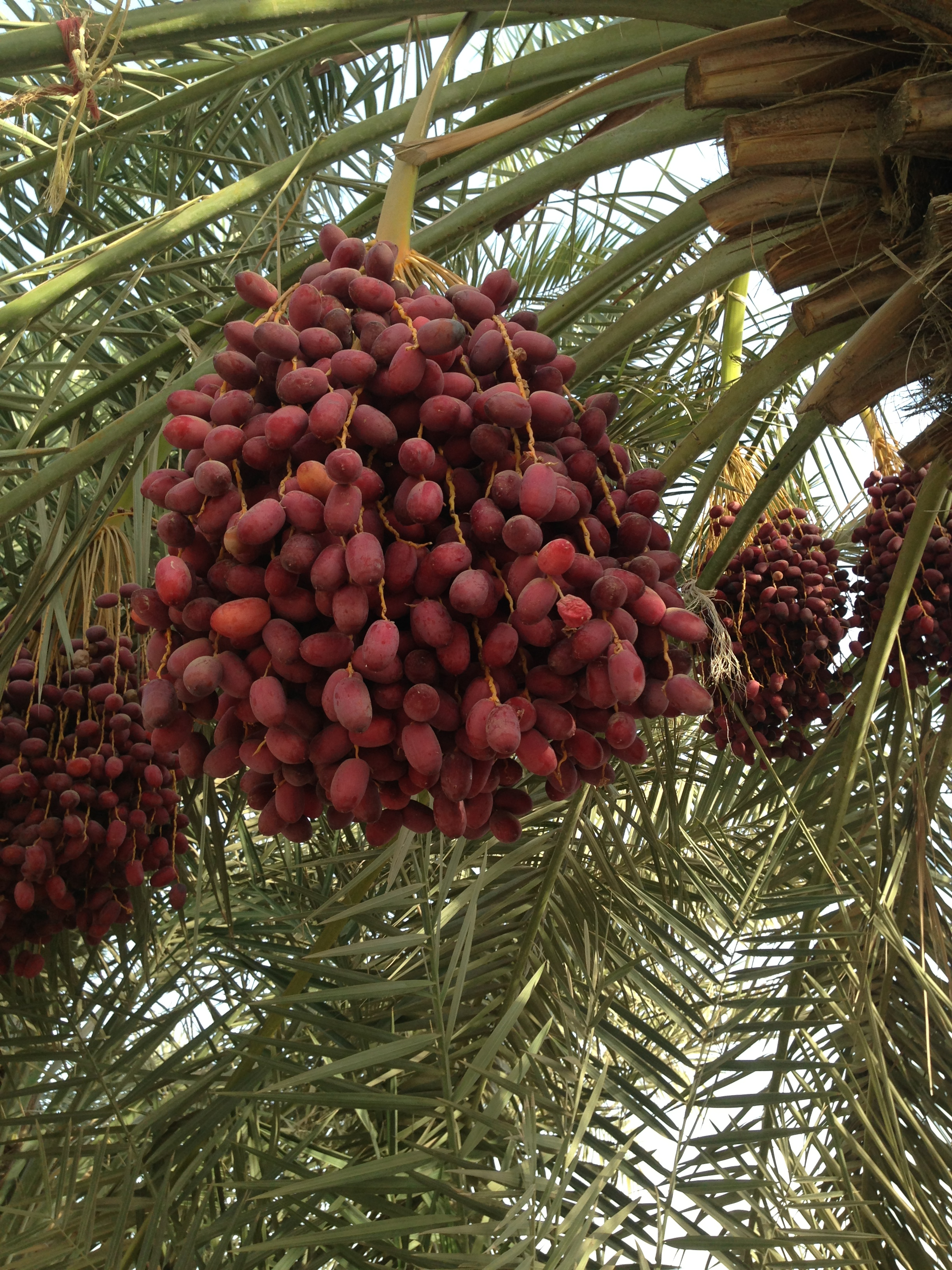 خنيزي (تمر)